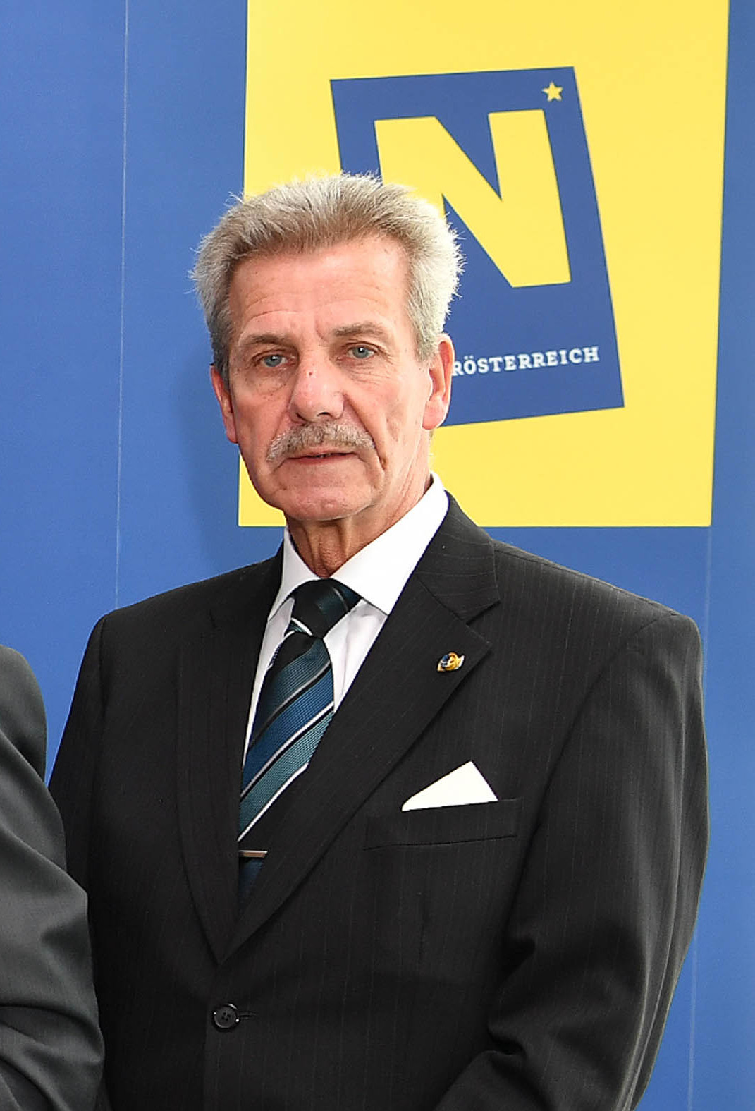 Landtagspräsident Karl Wilfing und Landeshauptfrau Johanna Mikl-Leitner bei der Festveranstaltung anlässlich 20 Jahre Landesrechnungshof. Fotos: NLK/Filzwieser